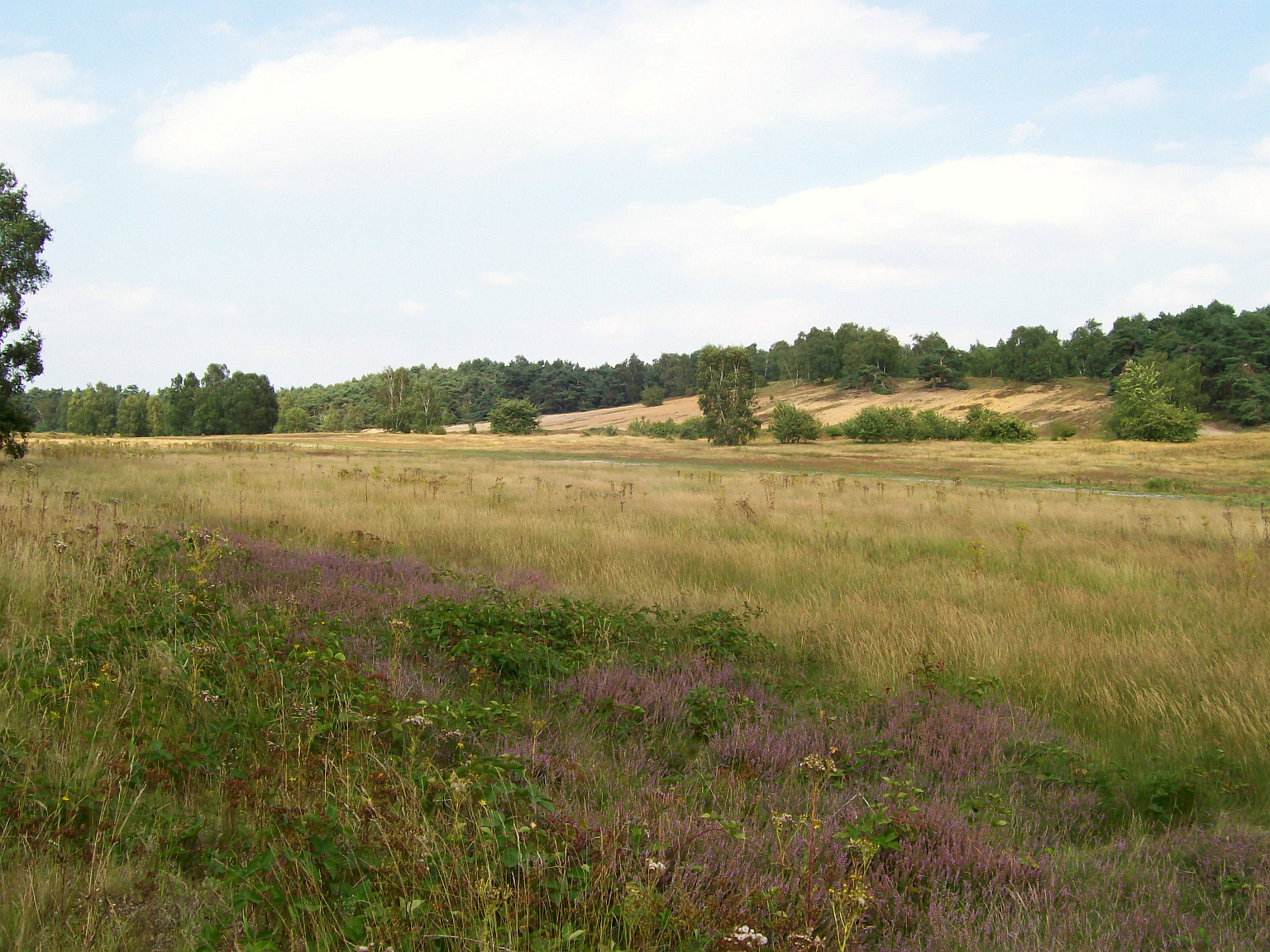 Magerrasen und Heidereste am Fliegerberg (Die Berge), Kreis Borken